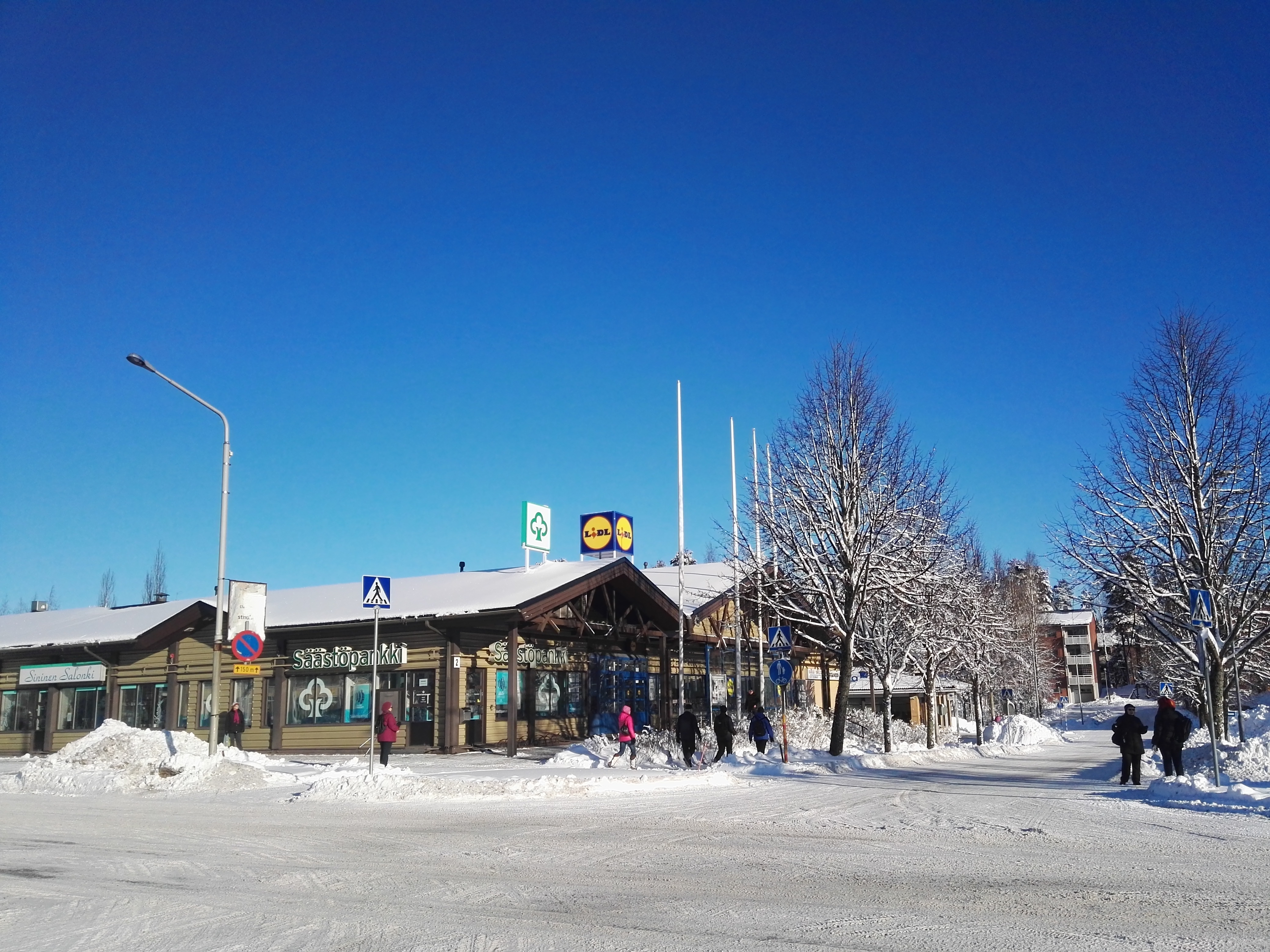 Rakokiven liikekeskus Nastolassa, Lahdessa.